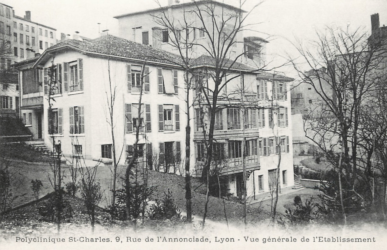 Clinique des sœurs hospitalières de Saint-Charles, Lyon. Adresse : 25-27, rue de Flesselles (ou rue de l'Annonciade).